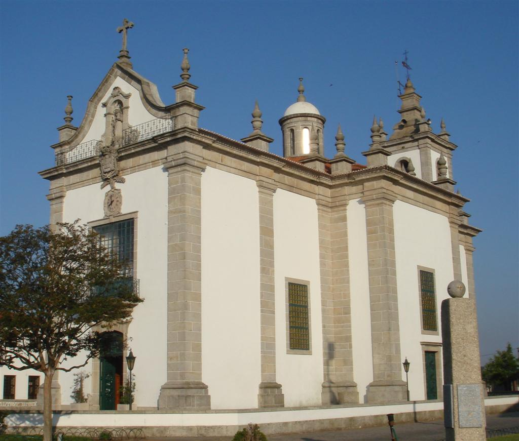 Igreja de Nossa Senhora das Necessidades na freguesia de Barqueiros, Concelho de Barcelos. A tradição diz que João Veloso Miranda, nascido em 3 de fevereiro de 1700, e que a partir de 1738 usa o termo “Frei” ao tornar-se Cavaleiro da Ordem de Cristo (e daí o uso do termo “frei”, pois não era monge) que trouxera aquela devoção de Lisboa, do Palácio Nacional das Necessidades, atual sede do Ministério dos Negócios Estrangeiros, e, então, propriedade dos padres oratórios. Pois este barqueirense, após ter regressado da capital e já na sua terra natal é acometido de doença grave e, depois de curado pela intervenção daquela Santa, decidiu colocar a sua imagem num oratório junto da sua casa, em 1746. O milagre espalhou-se rapidamente pelas redondezas; a devoção expande-se com romeiros a chegarem de toda a parte norte; as esmolas são muitas…o que leva a aumentar o espaço: primeiro uma capela e depois o Santuário atual, que demorou 15 anos a construir e que entra em funcionamento com a colocação da imagem no seu interior, em 1762. Em 1799, um devoto natural de S. Cosme, Gondomar, ofereceu o valor de uma junta de bois com a intenção de se fazer um altar de fora do Santuário para dele se ouvir a missa campal. Em 1802 constroem-se as duas capelas laterais do Santuário, hoje inexistentes, pois foram demolidas em meados do século XX. A 1 de Maio de 1920, o Arcebispo de Braga, D. Manuel Vieira Matos decretou a passagem da Matriz para o Santuário o que provocou situações de violência entre as Confrarias do Santíssimo e das Necessidades, conflito resolvido em 23 de Dezembro de 1930. As armas da Casa de Baçar, de João Veloso Miranda, aparecem, também, numa casa em S. Salvador do Campo, noutra em Criaz, Apúlia, num jazigo do cemitério de Esposende e no interior do Santuário das Necessidades, local onde está enterrado o fundador do mesmo. Foto de Jose Goncalves